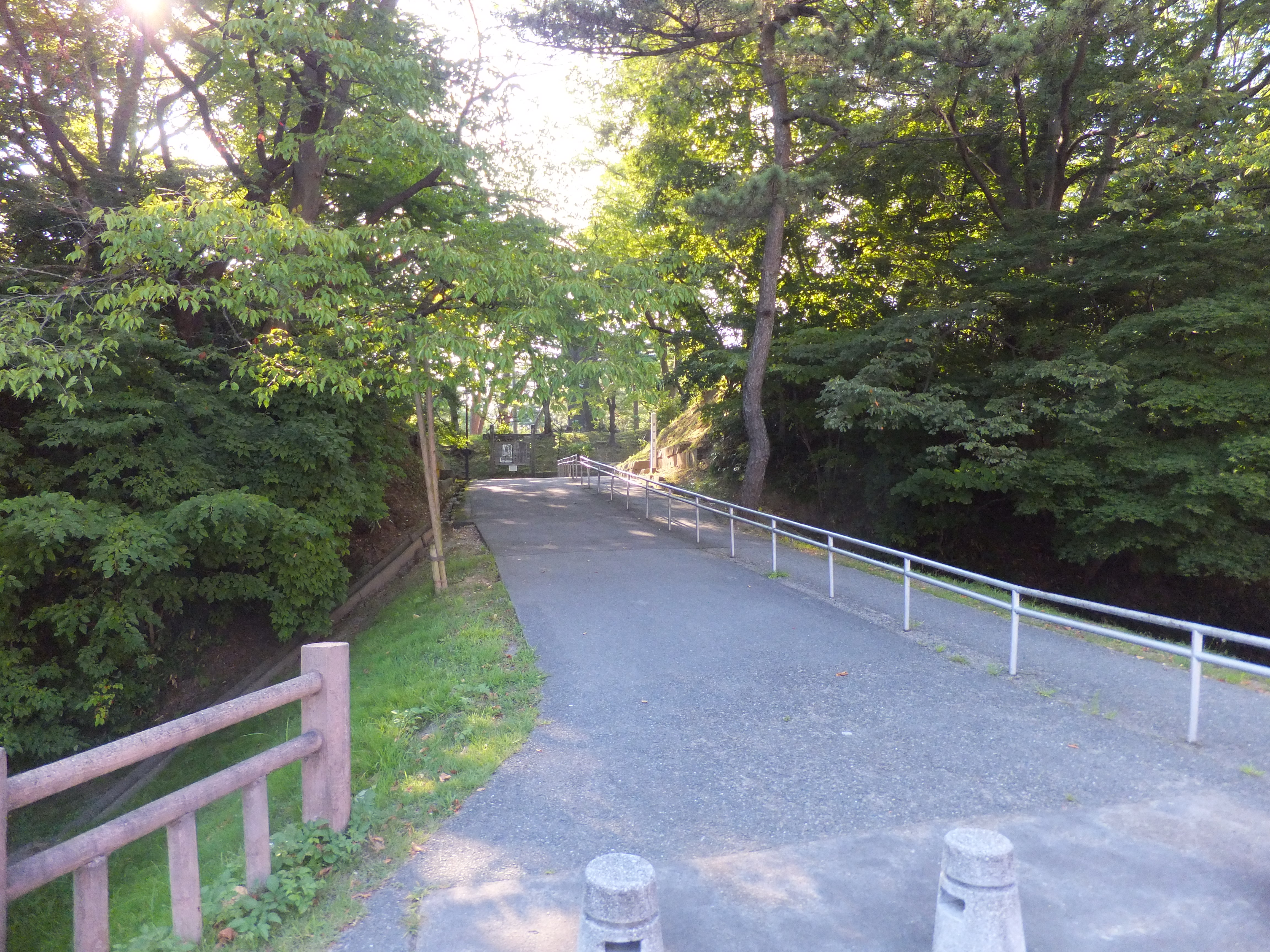 久保田城、唐金橋と黒門跡。江戸時代はこちらが正規の登城ルートであった。